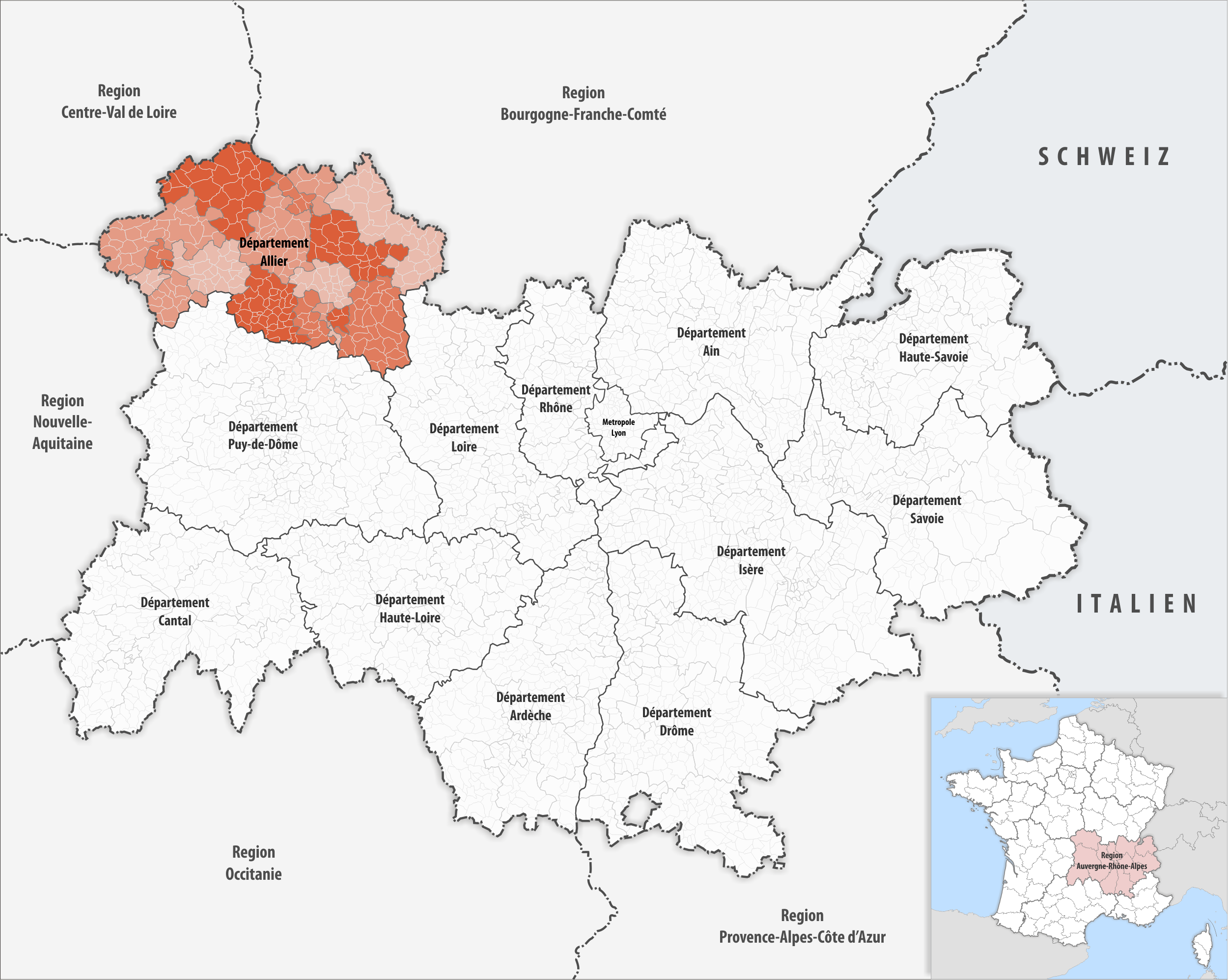 Lage des Departements Allier